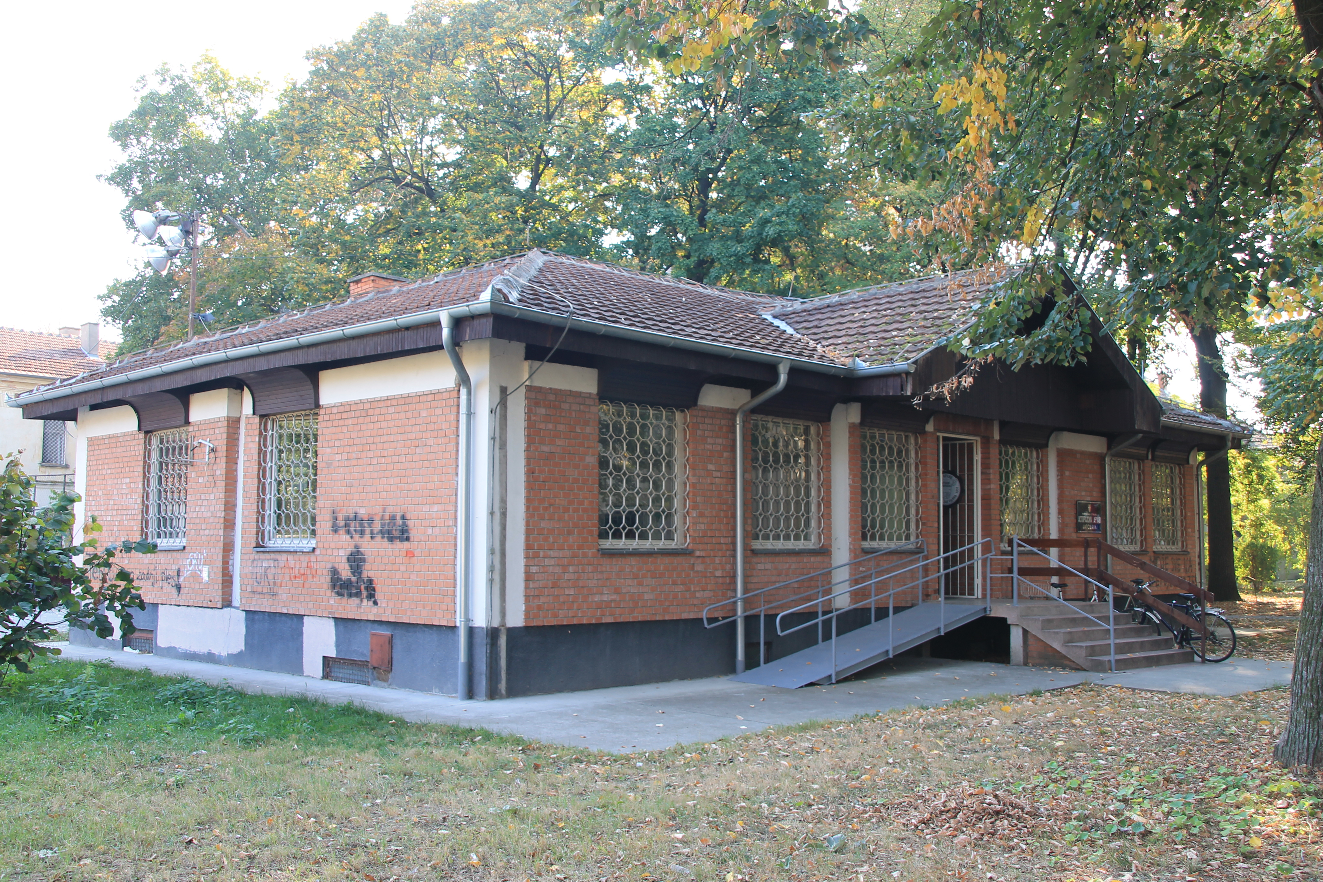 Zgrada arhiva